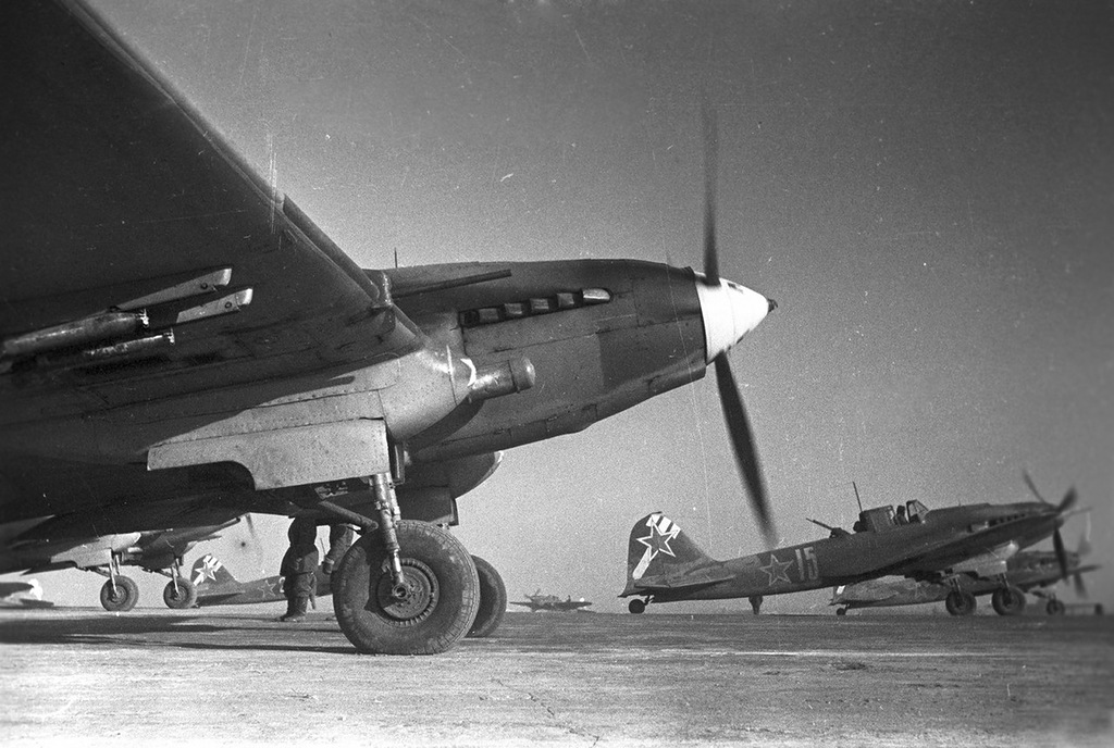 Советские самолеты-штурмовики Ил-2 вылетают на боевое задание под Сталинградом